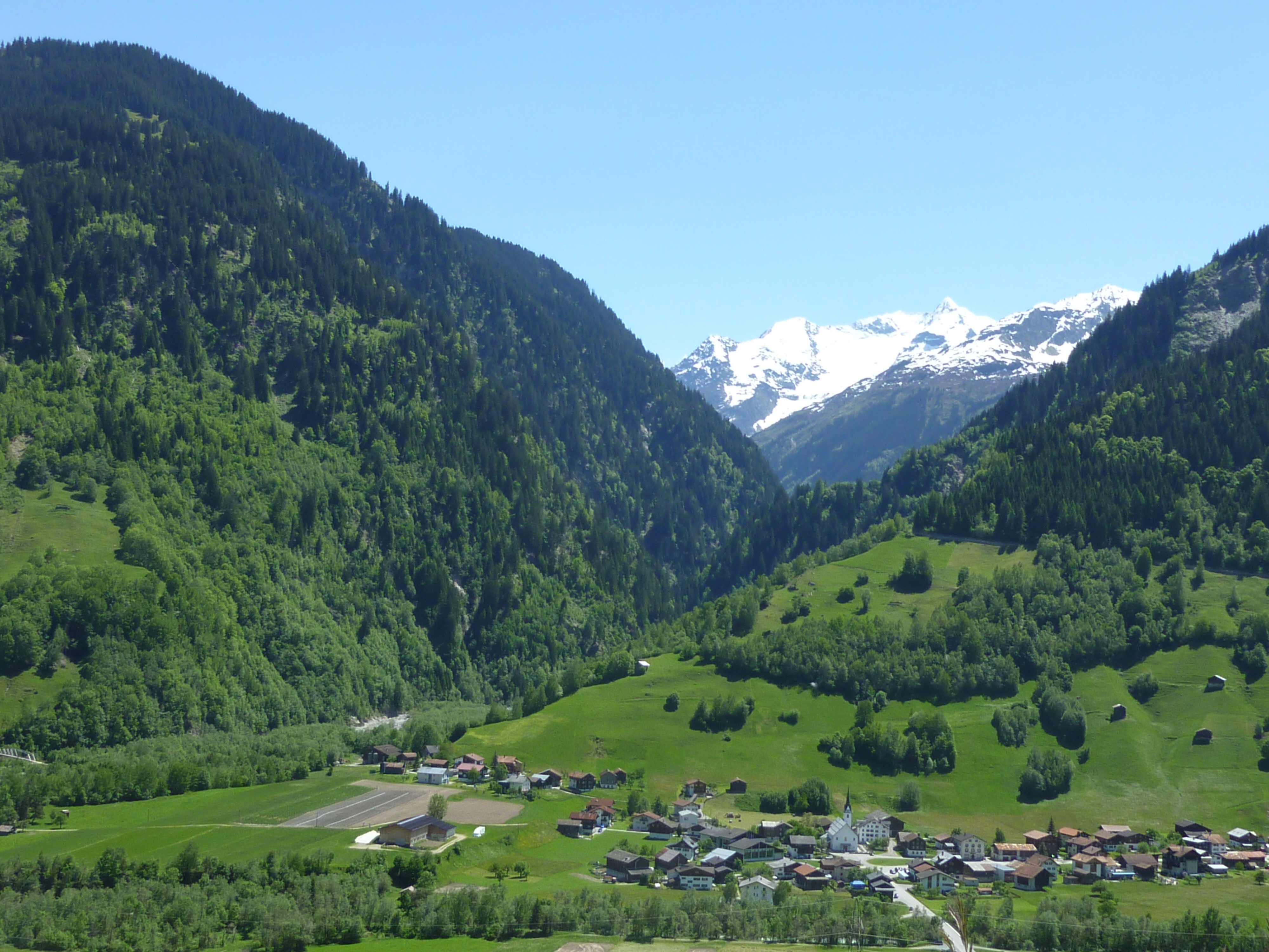 Surrein - Val Sumvitg